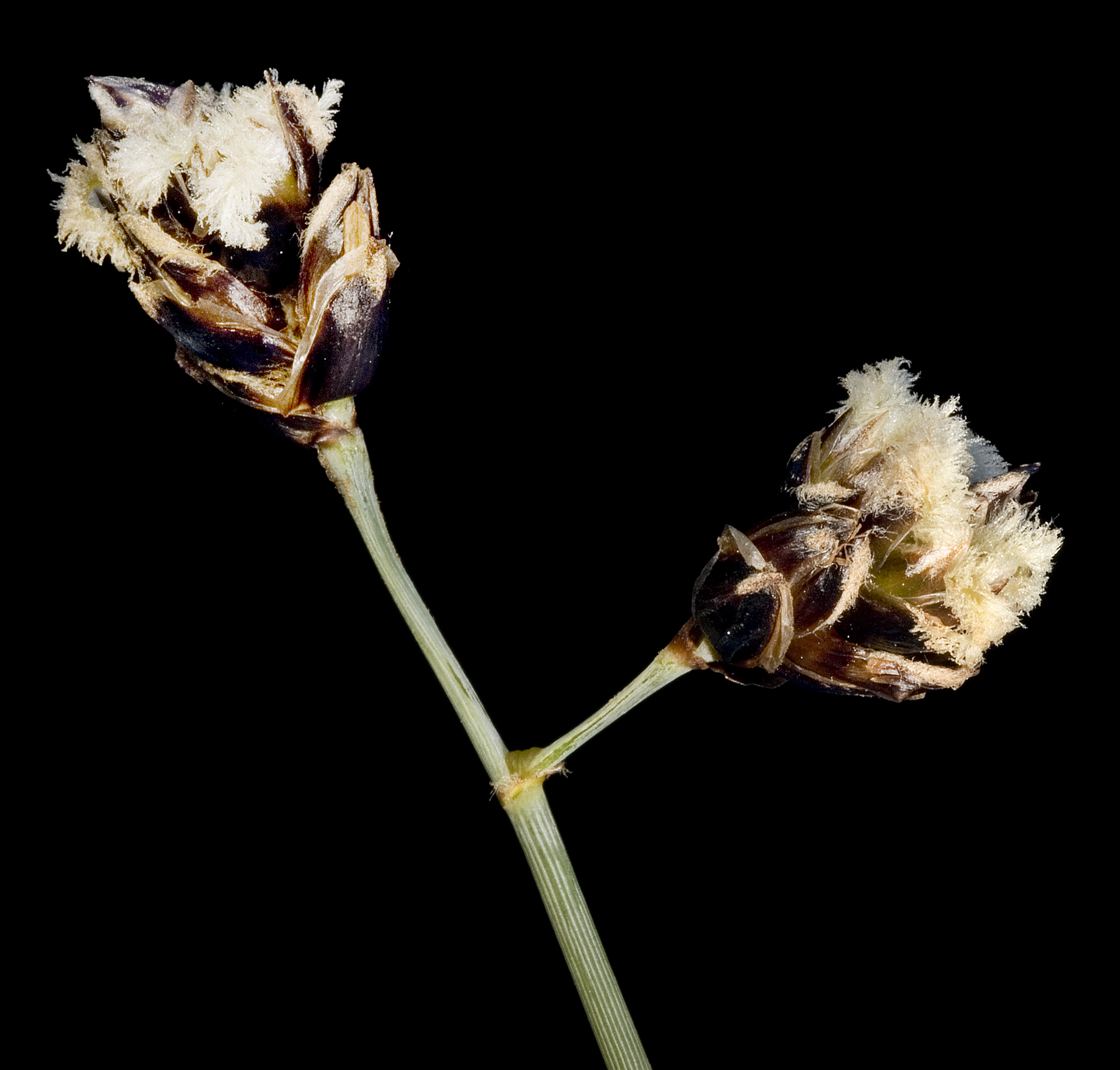 KRT3775